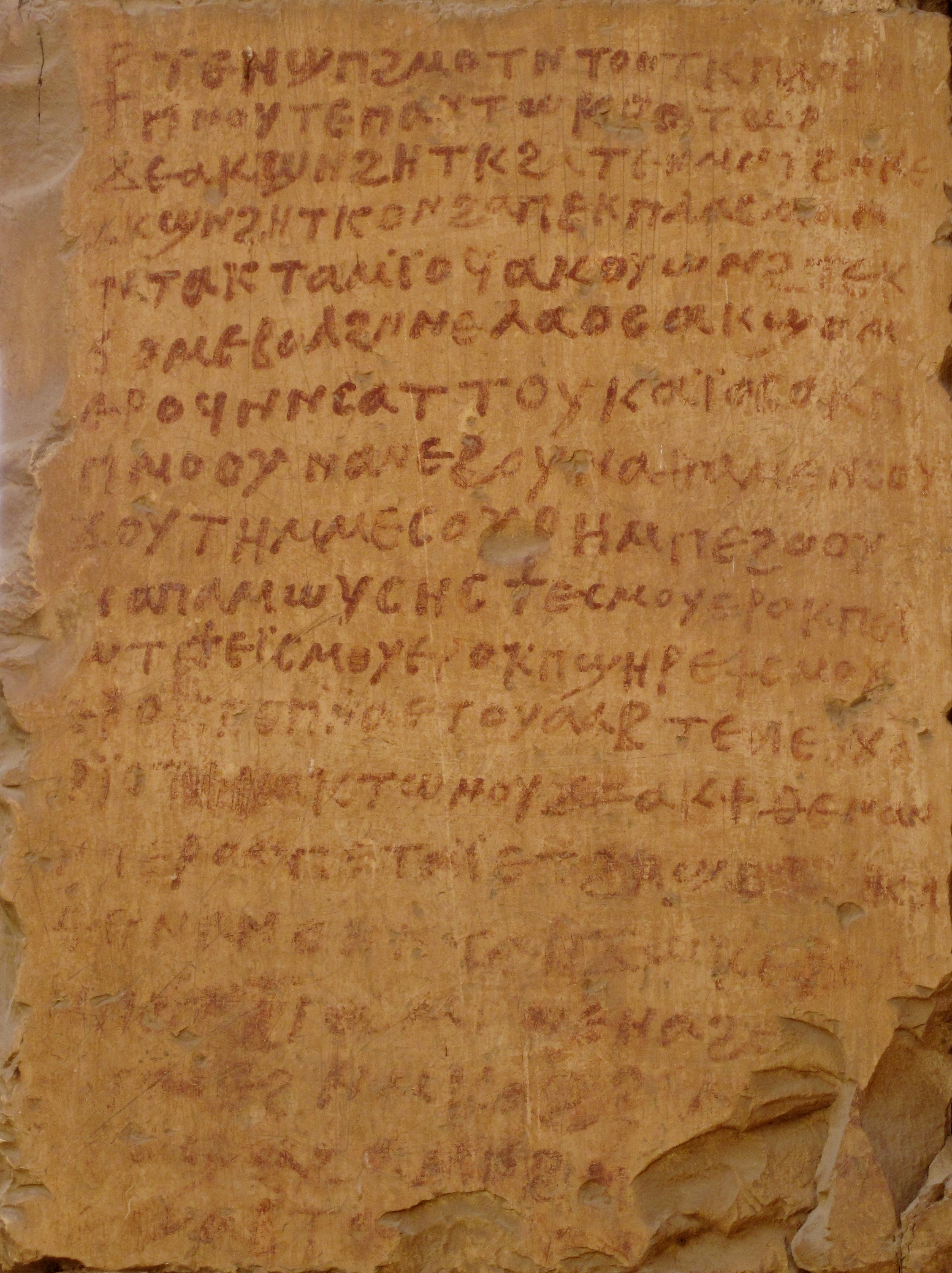 Koptische Inschrift vor der Barkenhalle im Totentempel Sethos I. in Abydos, Ägypten